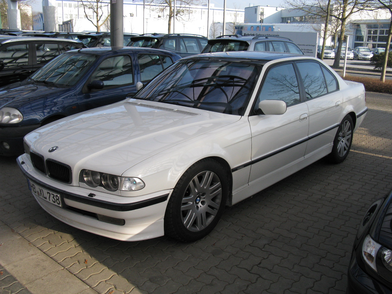 BMW 7 Series E38